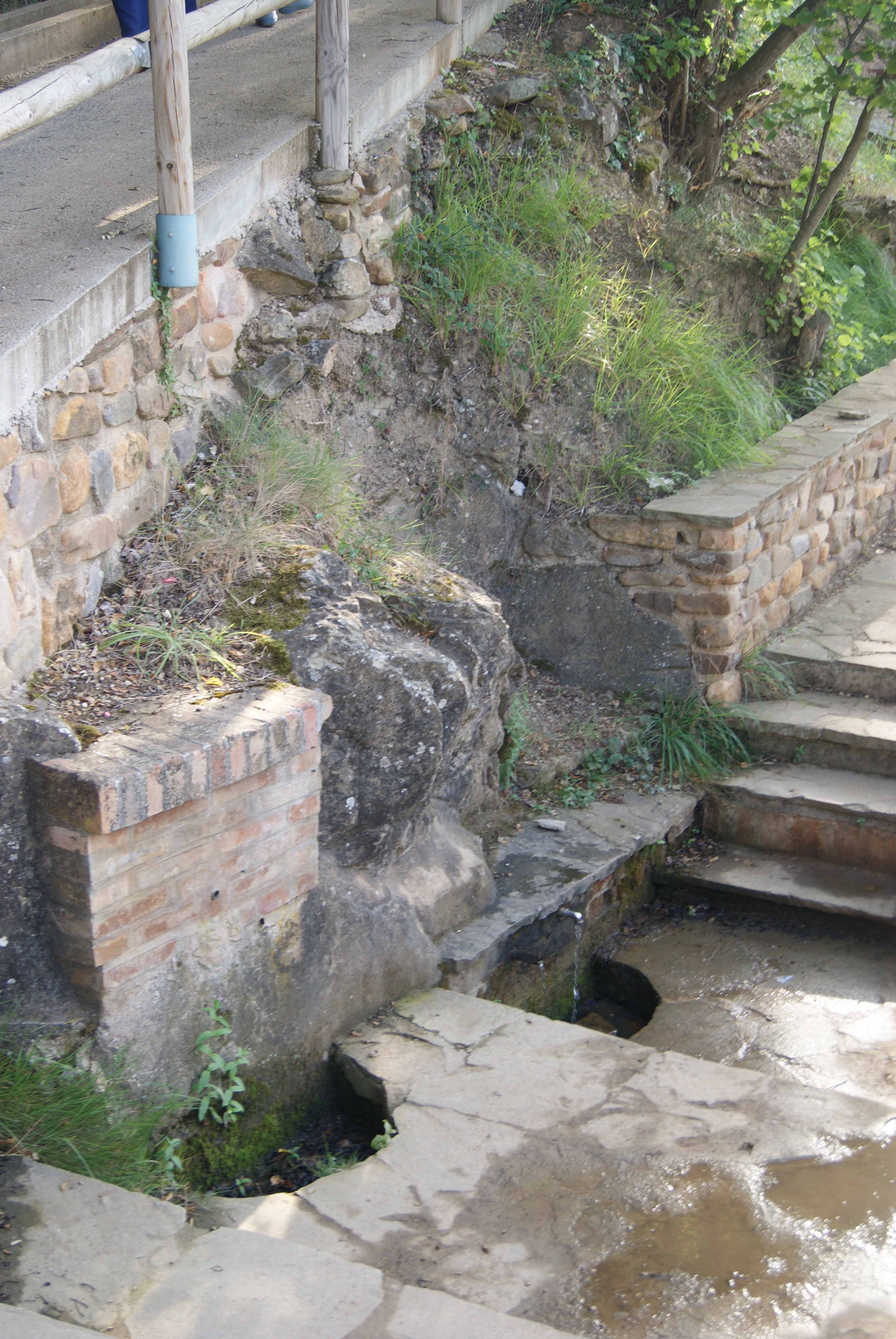 fuente de los ancebillos